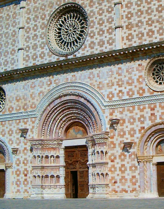 l'Aquila: Santa Maria di Collemagio categorie:Afbeelding Abruzzen